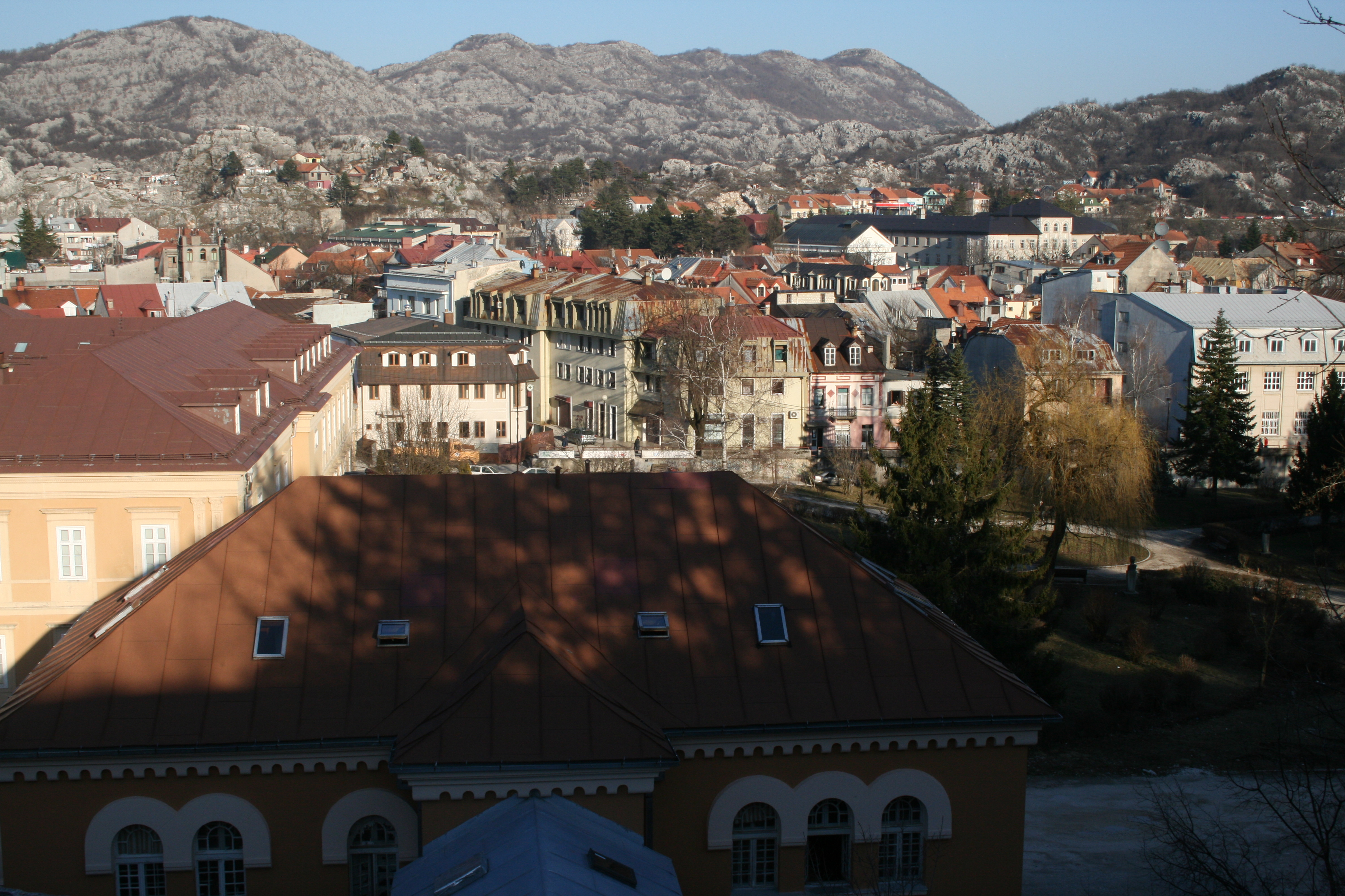 Pohled na Cetinje, historickou metropoli Černé Hory